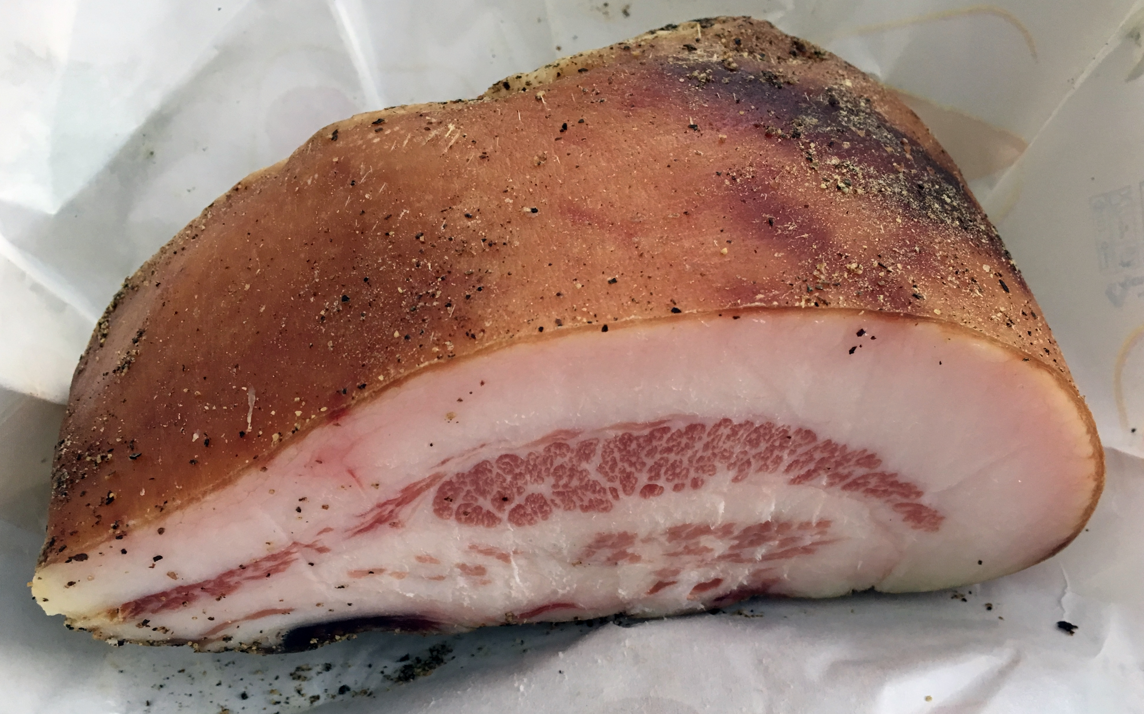 Guanciale al Pepe (circa 800g) = italienischer luftgetrockneter, ungeräucherter Speck aus der Schweinebacke mit Pfeffer.